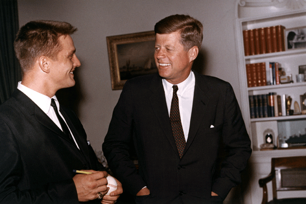 Source: Gerald Ford Presidental Library and Museum